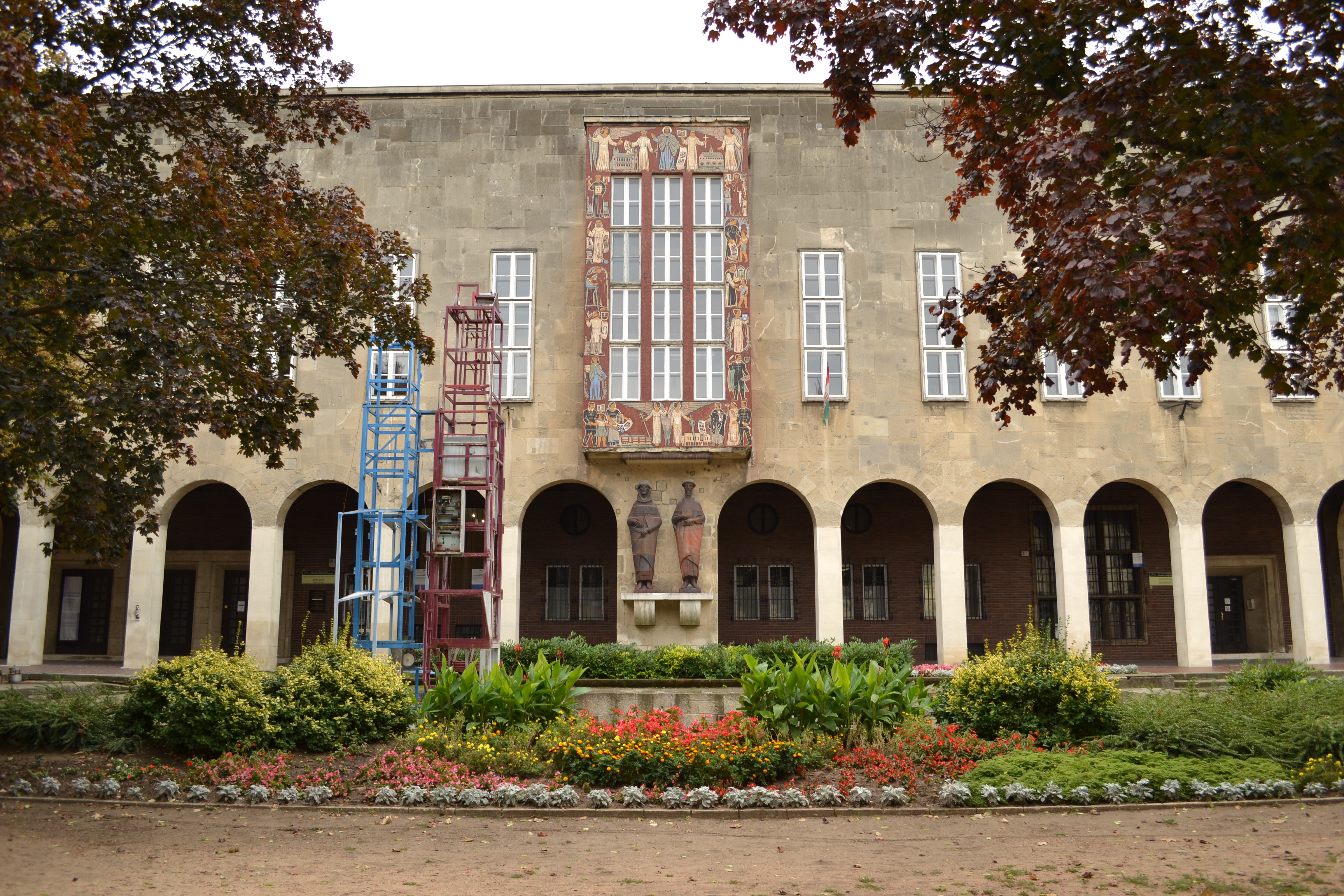 középület – kultúrház This is a photo of a monument in Hungary. Identifier: 11159